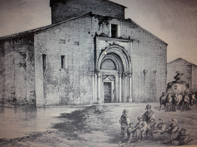 Bozzetto della cattedrale di Santa Sabina (Consalvo Carelli - 1889)